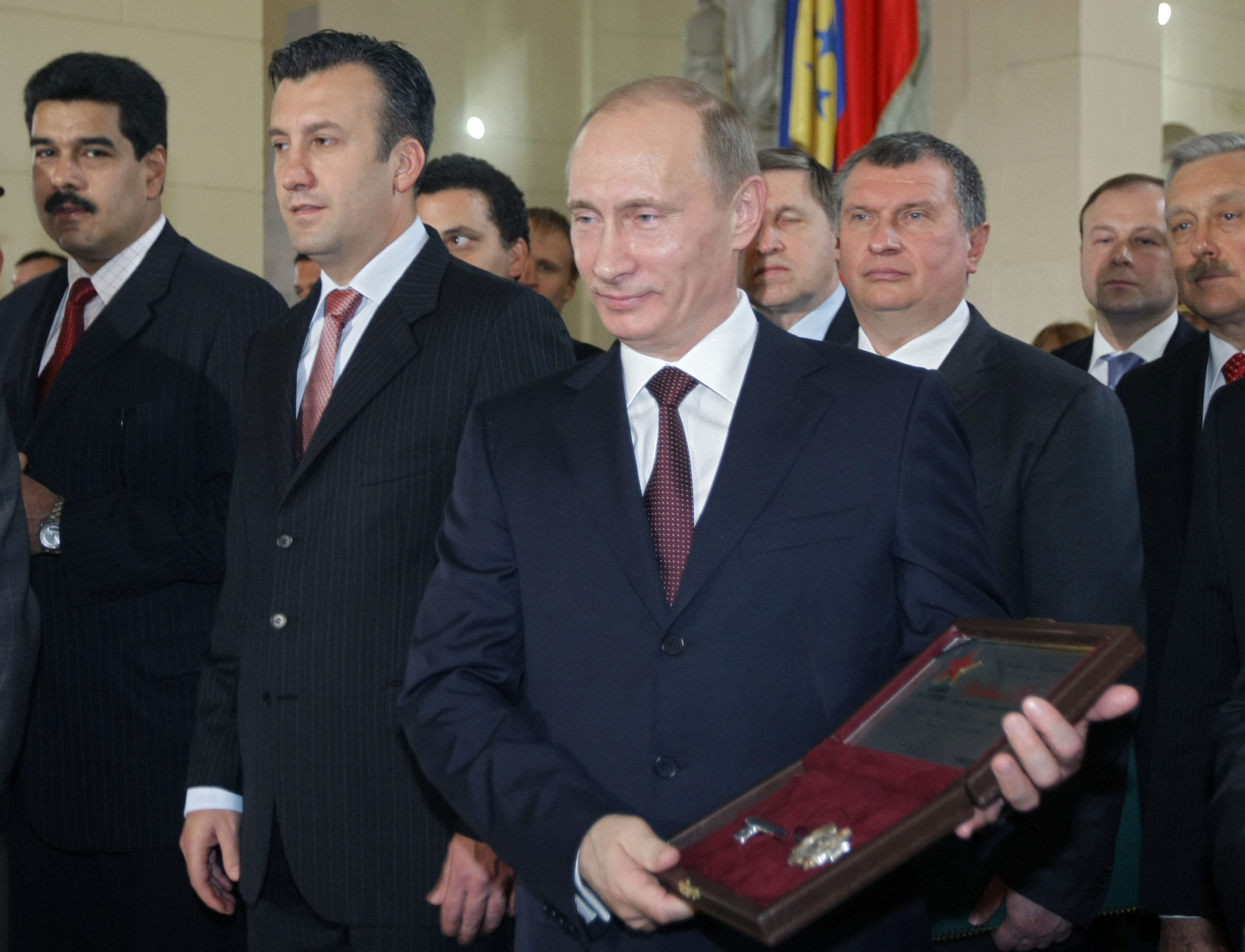 Председатель Правительства Российской Федерации В.В.Путин получил символический ключ от венесуэльской столицы, города Каракаса